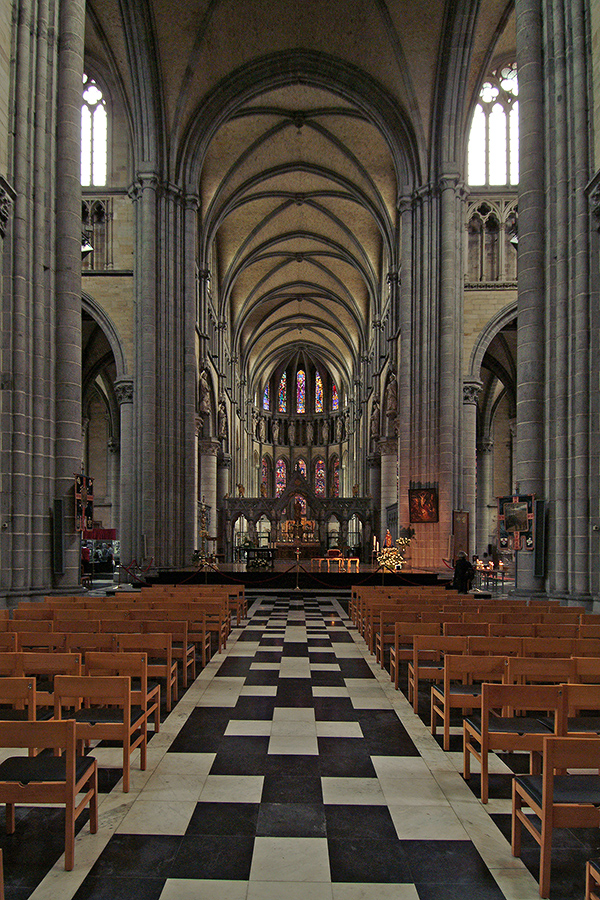 Sint-Maartenskerk, Ypern, Belgien, Flandern, Ieper